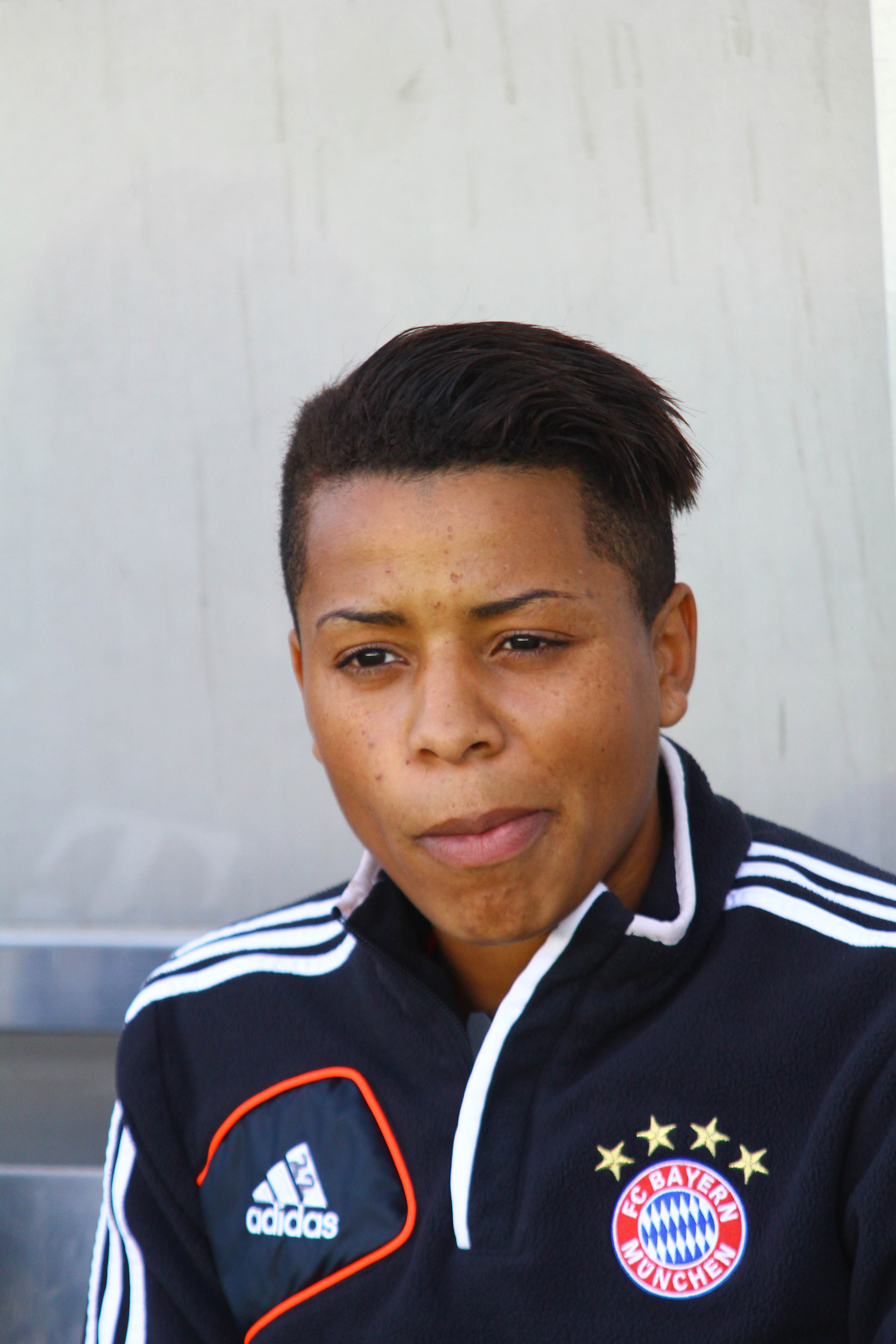 German footballer Sylvie Banecki, FC Bayern München